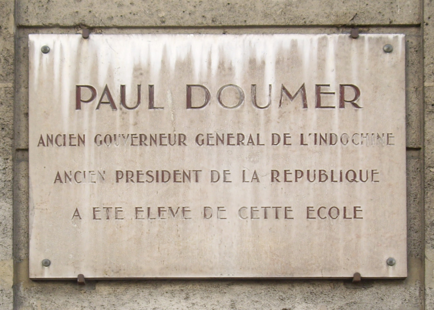 Plaque apposée sur l'actuel collège Roland Dorgelès (ancienne école primaire de garçons) au n° 63 de la rue de Clignancourt, Paris 18e.« Paul Doumer, ancien gouverneur général de l'Indochine, ancien président de la République, a été élève de cette école. »